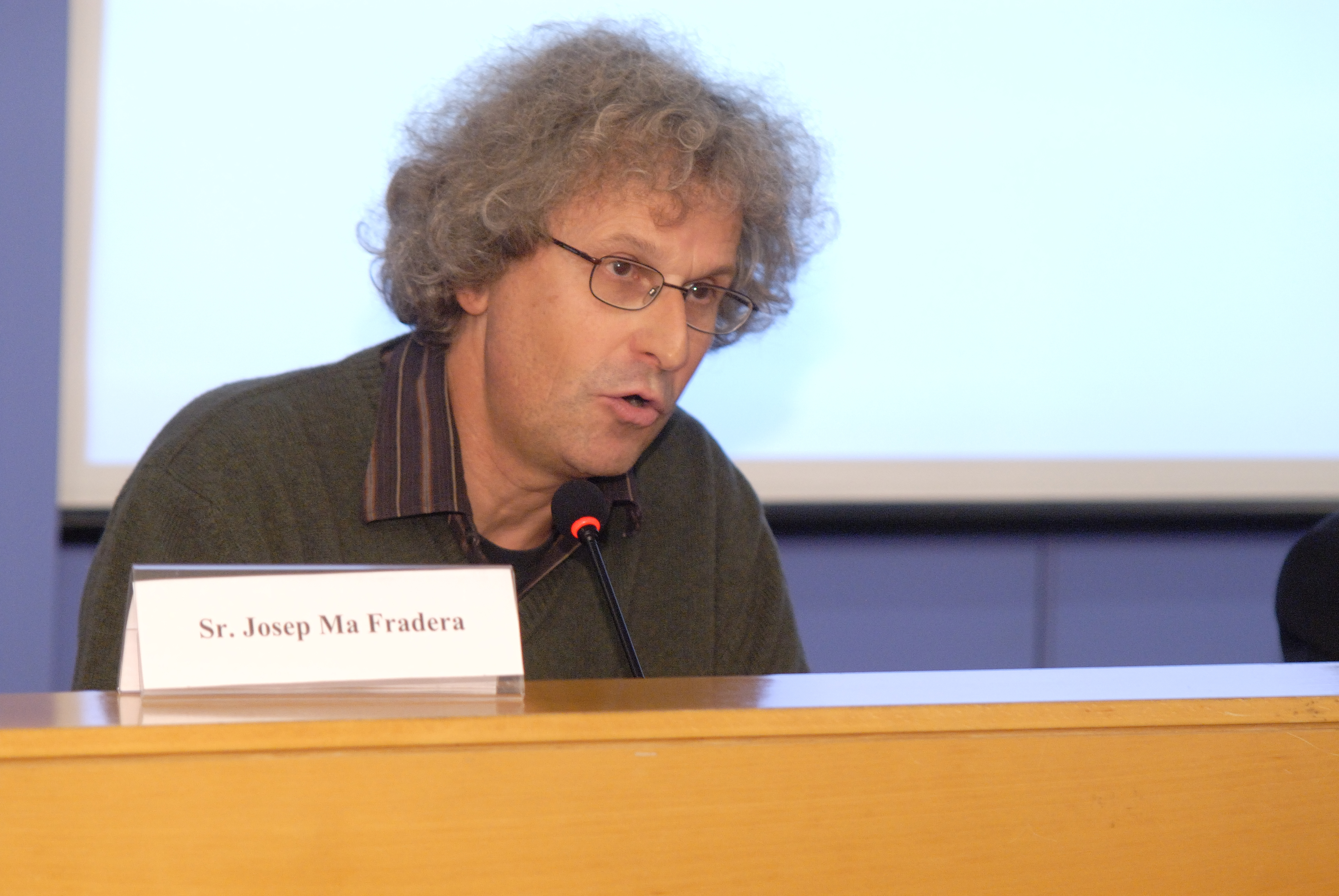 Josep Maria Fradera al MHC el 2008.